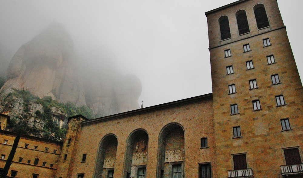 Monestir de Santa Maria de Montserrat (Monistrol de Montserrat)